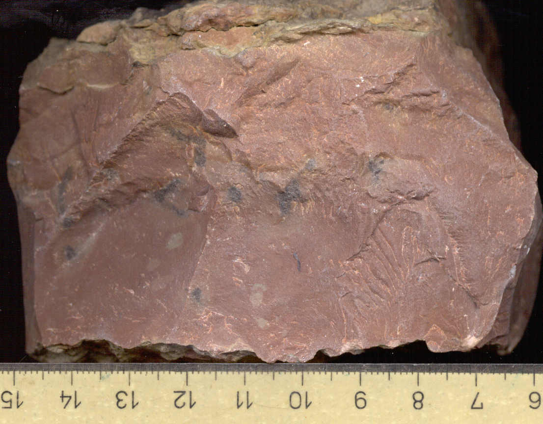 Dichter Kalkstein, durch Hämatiteinlagerung rot gefärbt; Fundort: Zickersches Höft auf Rügen, eiszeitliches Geschiebe.